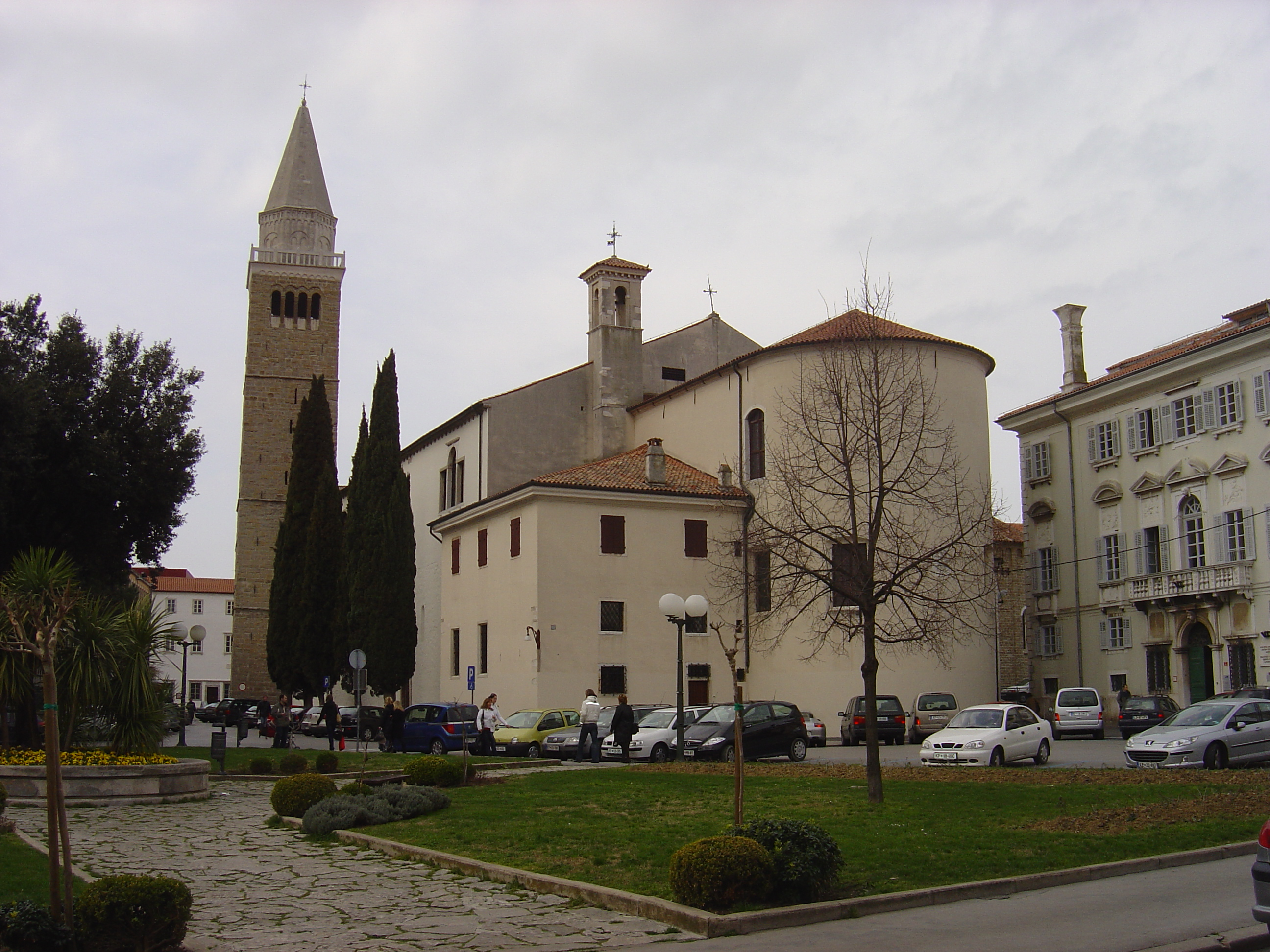 Koper, Slovenia